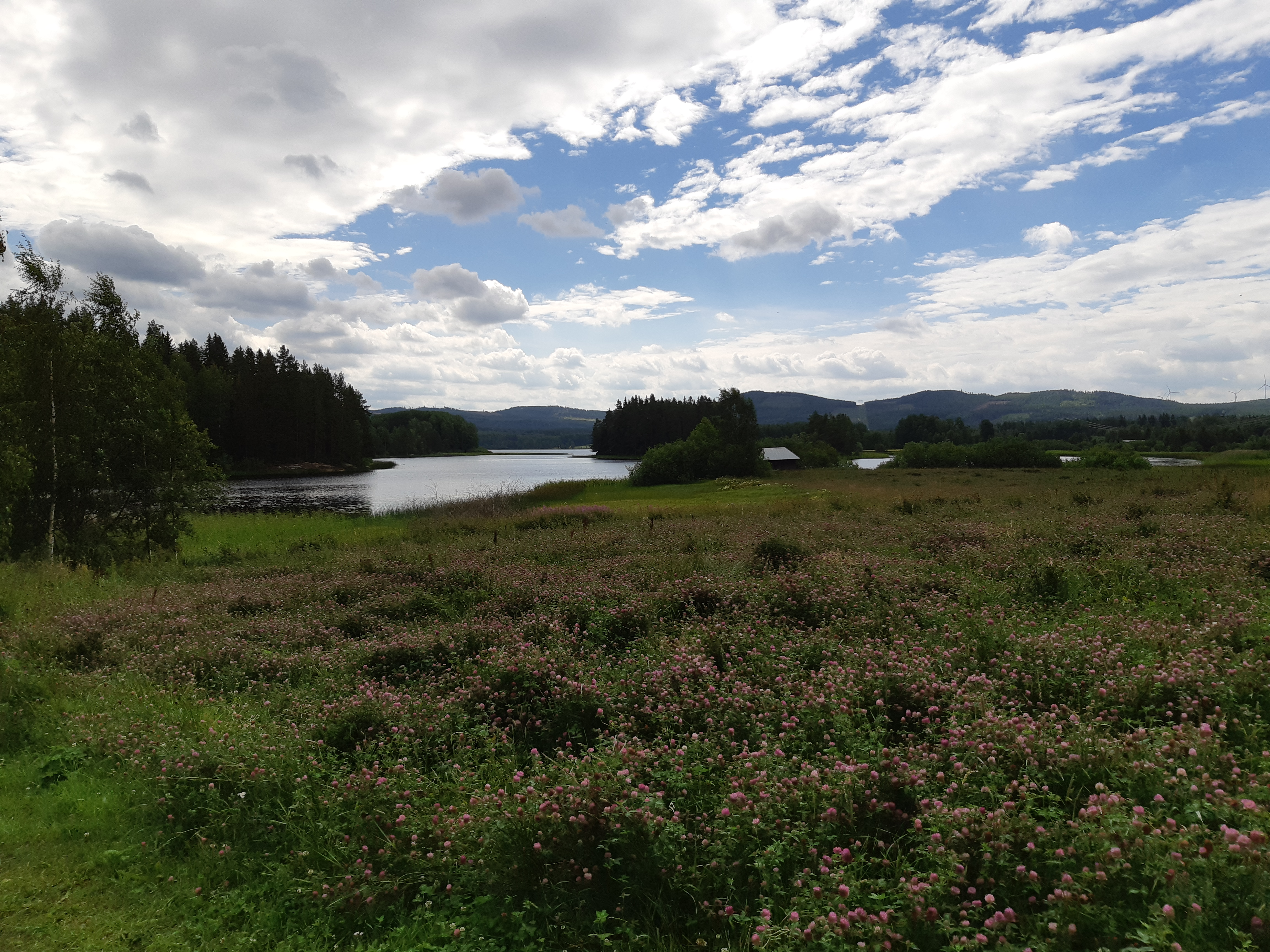 Vy från Lotviken.